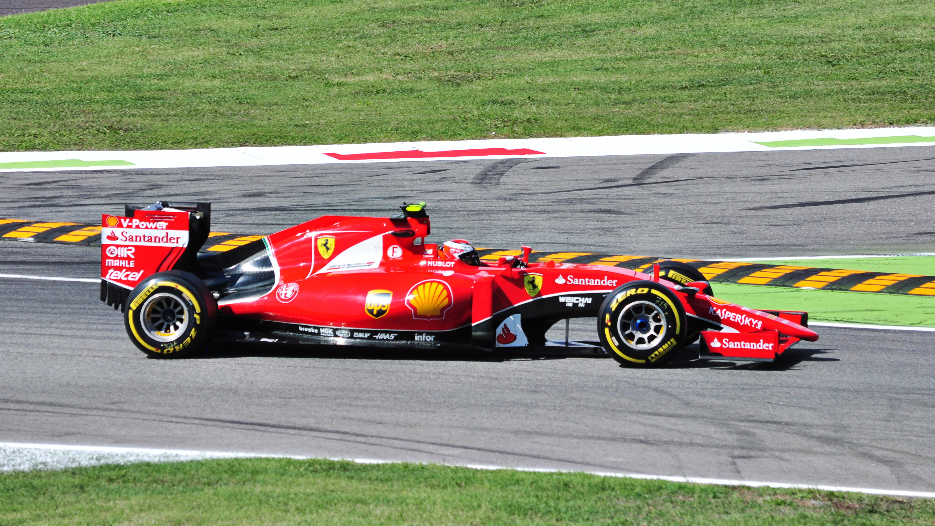 Ferrari SF15-T in Monza